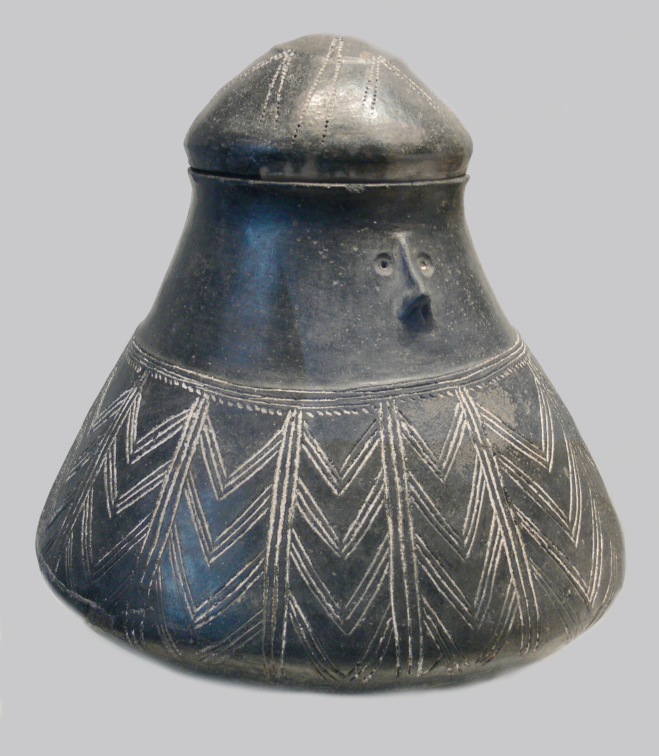 Gesichtsurne und Deckschale, Keramik; 6. Jh. v. Chr.; Dreidorf bei Lobsens (Łobżenica, Wielkopolska) Collection: Museum für Vor- und Frühgeschichte Berlin